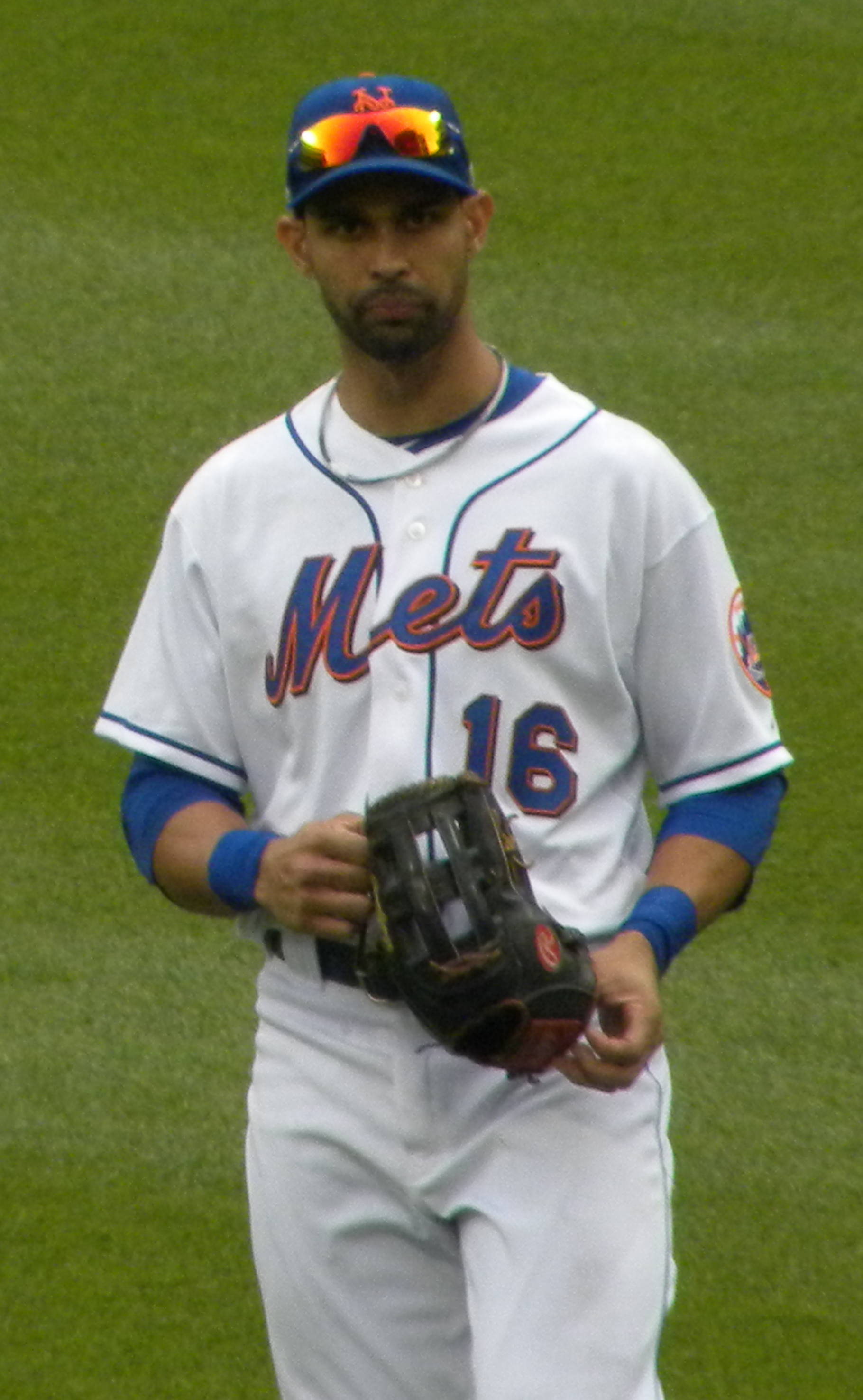 Ángel Pagán